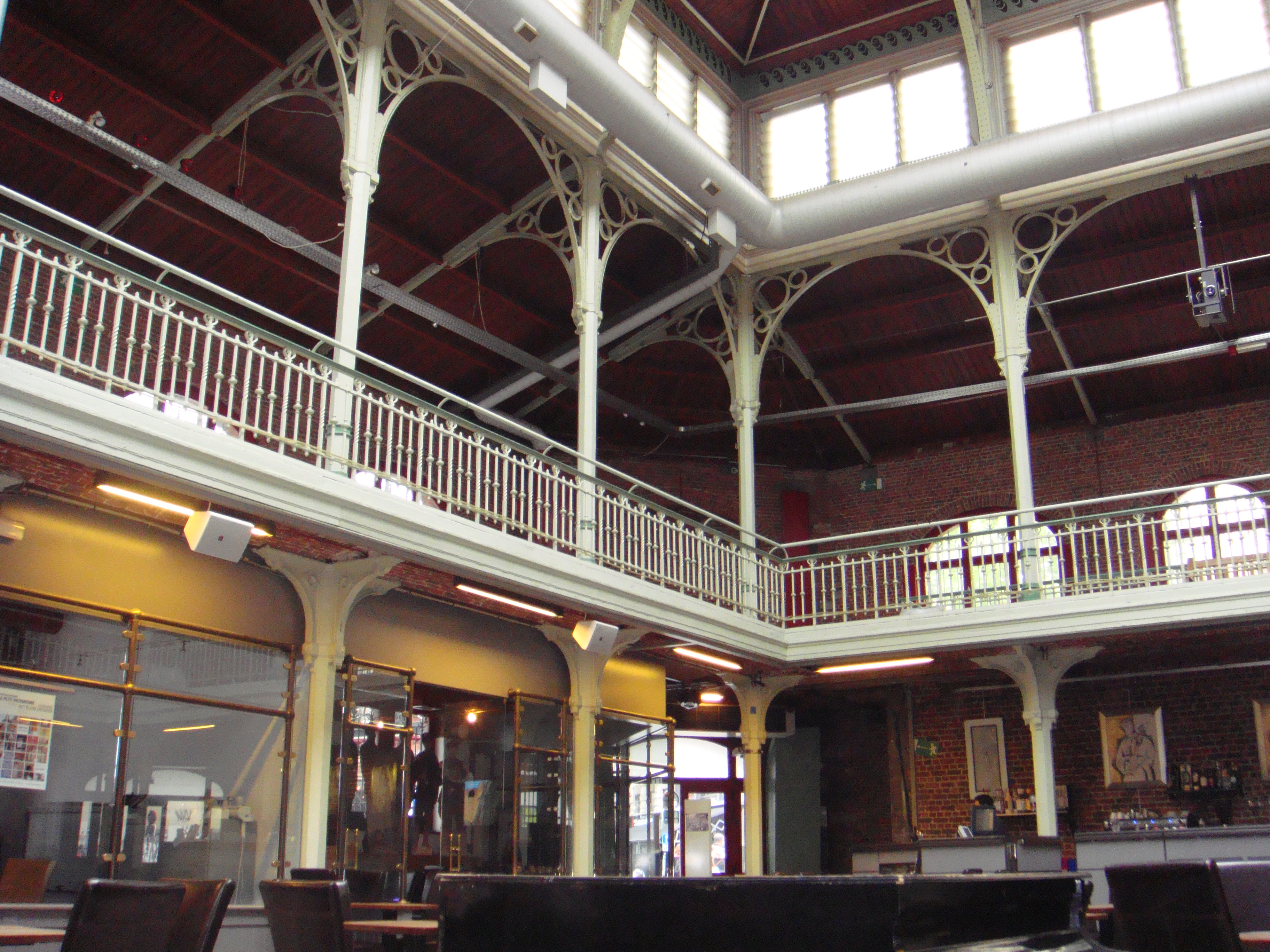 Sint Gorikshallen, binnen, 2043-0118/0